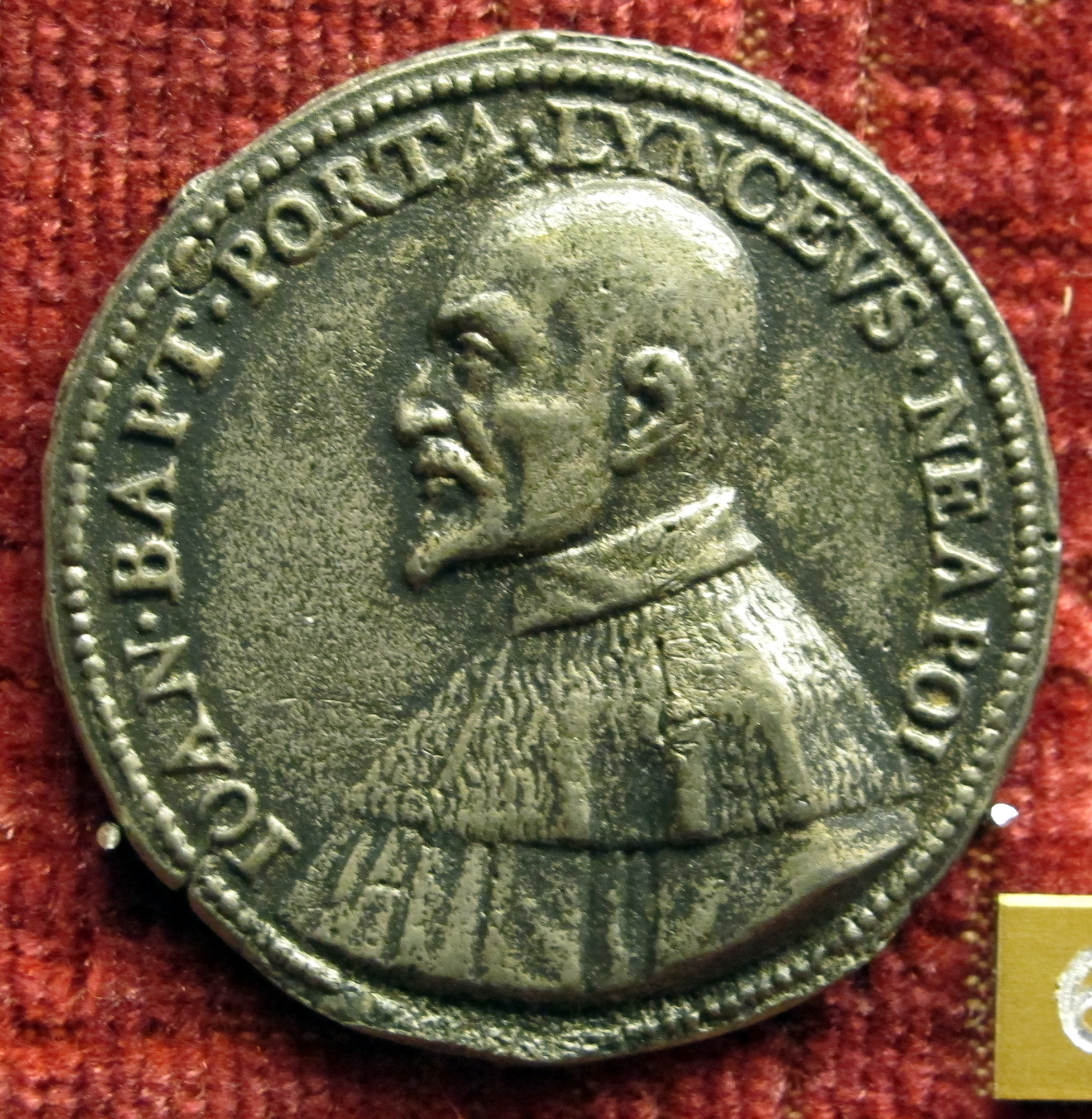 Giovanni Battista Della Porta (1535-1615), medaglia di autore anonimo